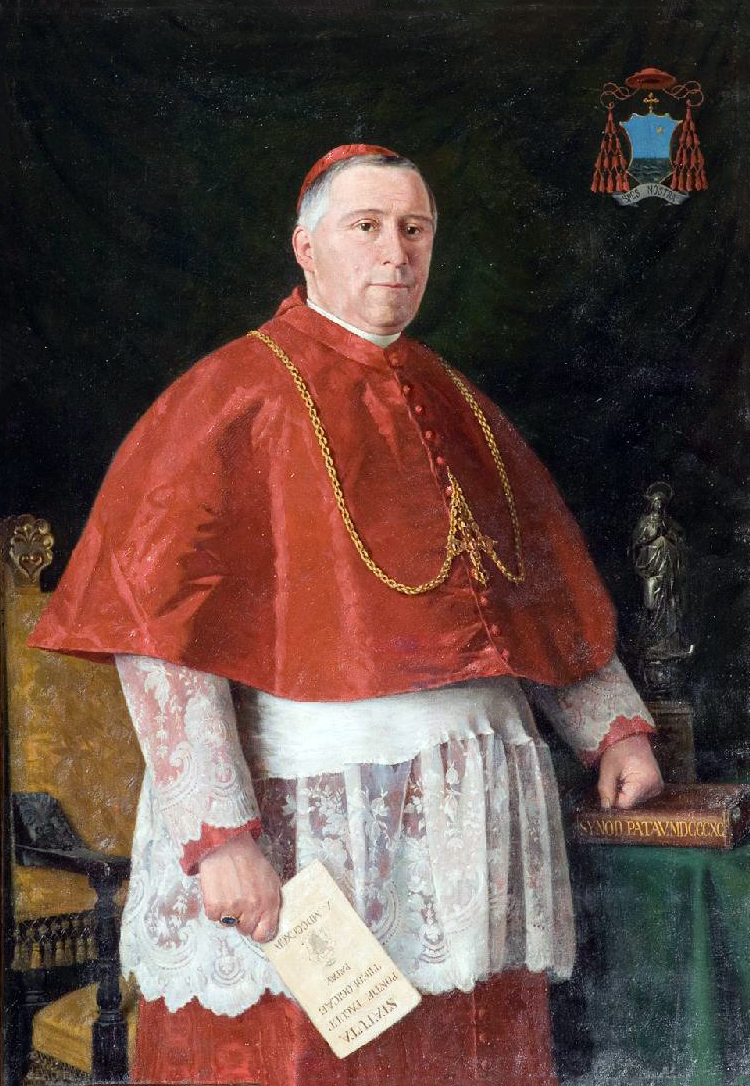 Paoletti A. E. (1895), Ritratto del cardinale Giuseppe Callegari/ stemma (angolo superiore destro) identificazione: Stemma del cardinale Giuseppe Callegari. (Stemma con mare in punta e stella d'oro nell'angolo superiore destro in campo azzurro; al di sopra è posta una croce, il tutto è sormontato da un cappello prelatizio rosso con quindici fiocchi per lato. Palazzo Vescovile - Padova)